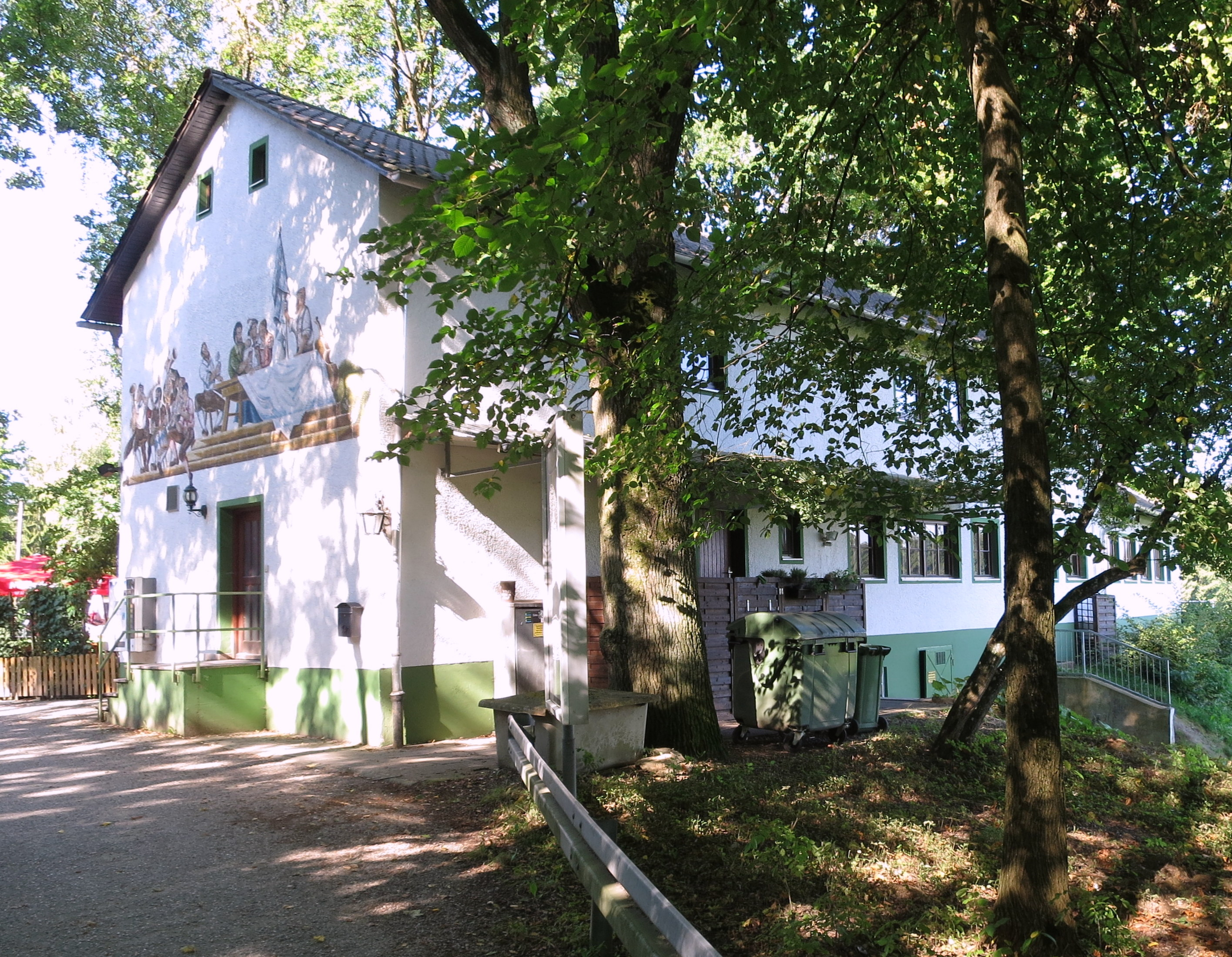 Vereinsheim von der Einfahrt her